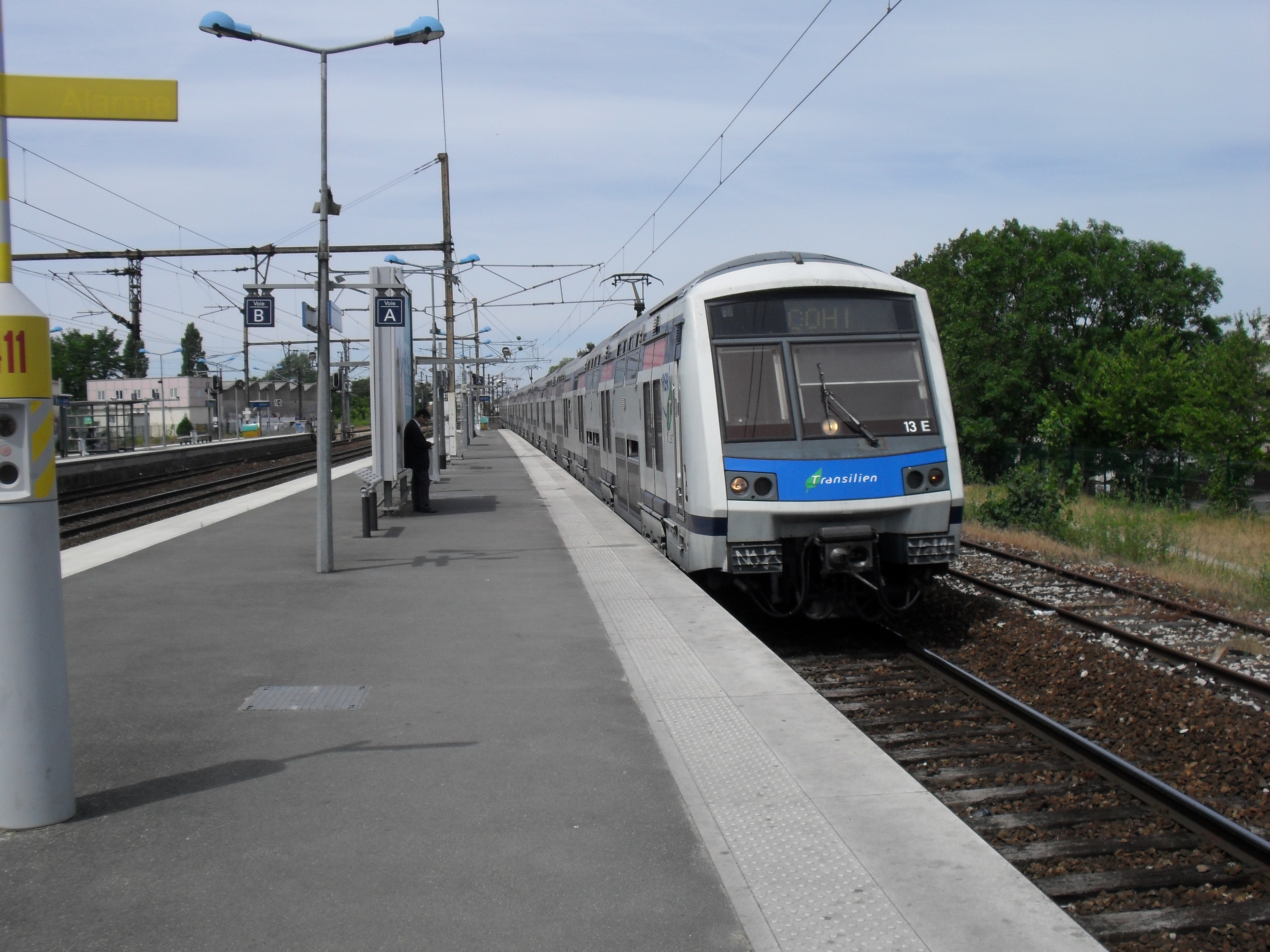 RER E - Gare de Gagny